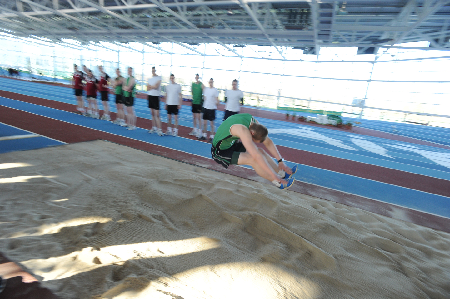 COL_0757